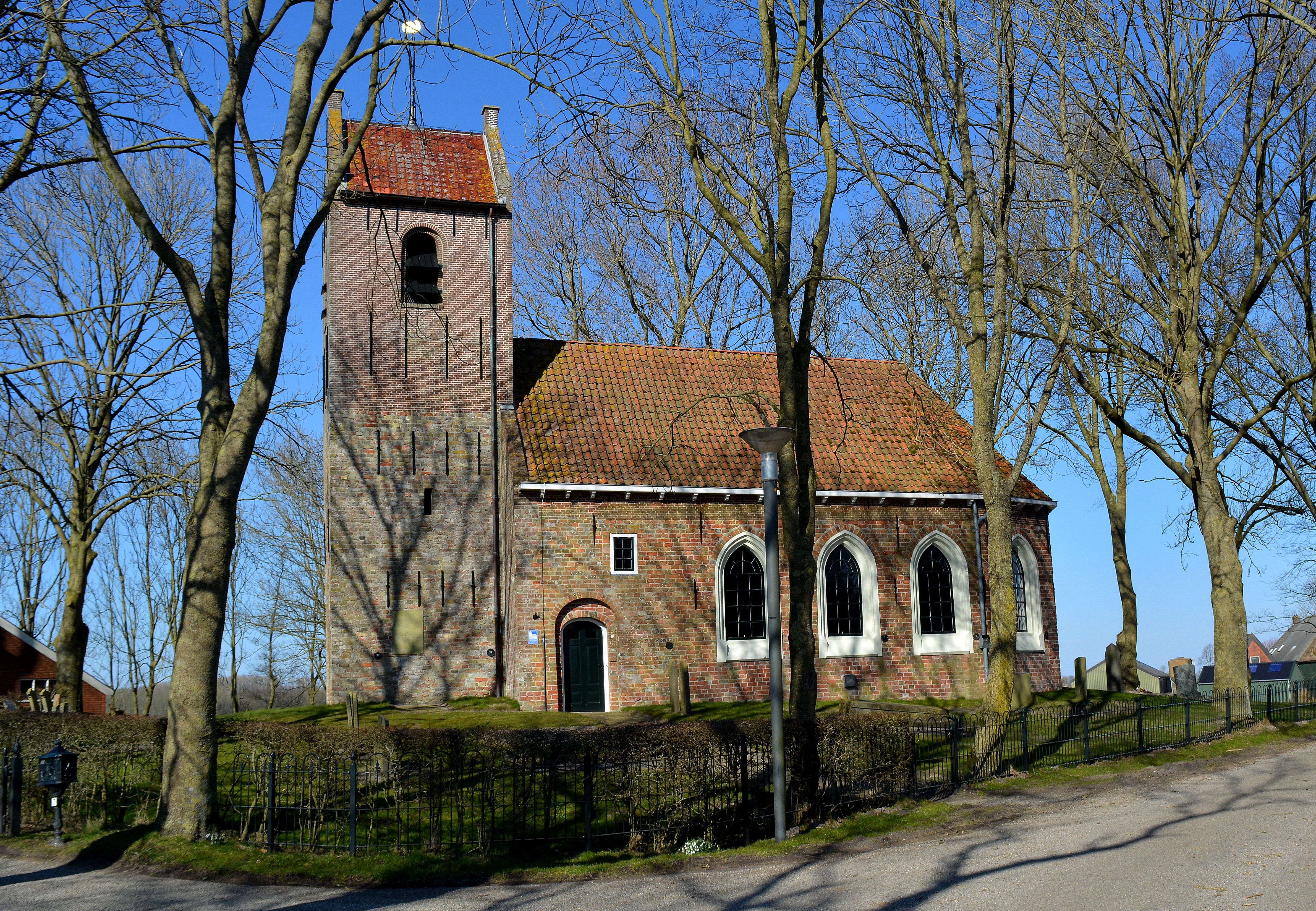 Jouswier, Petrustsjerke